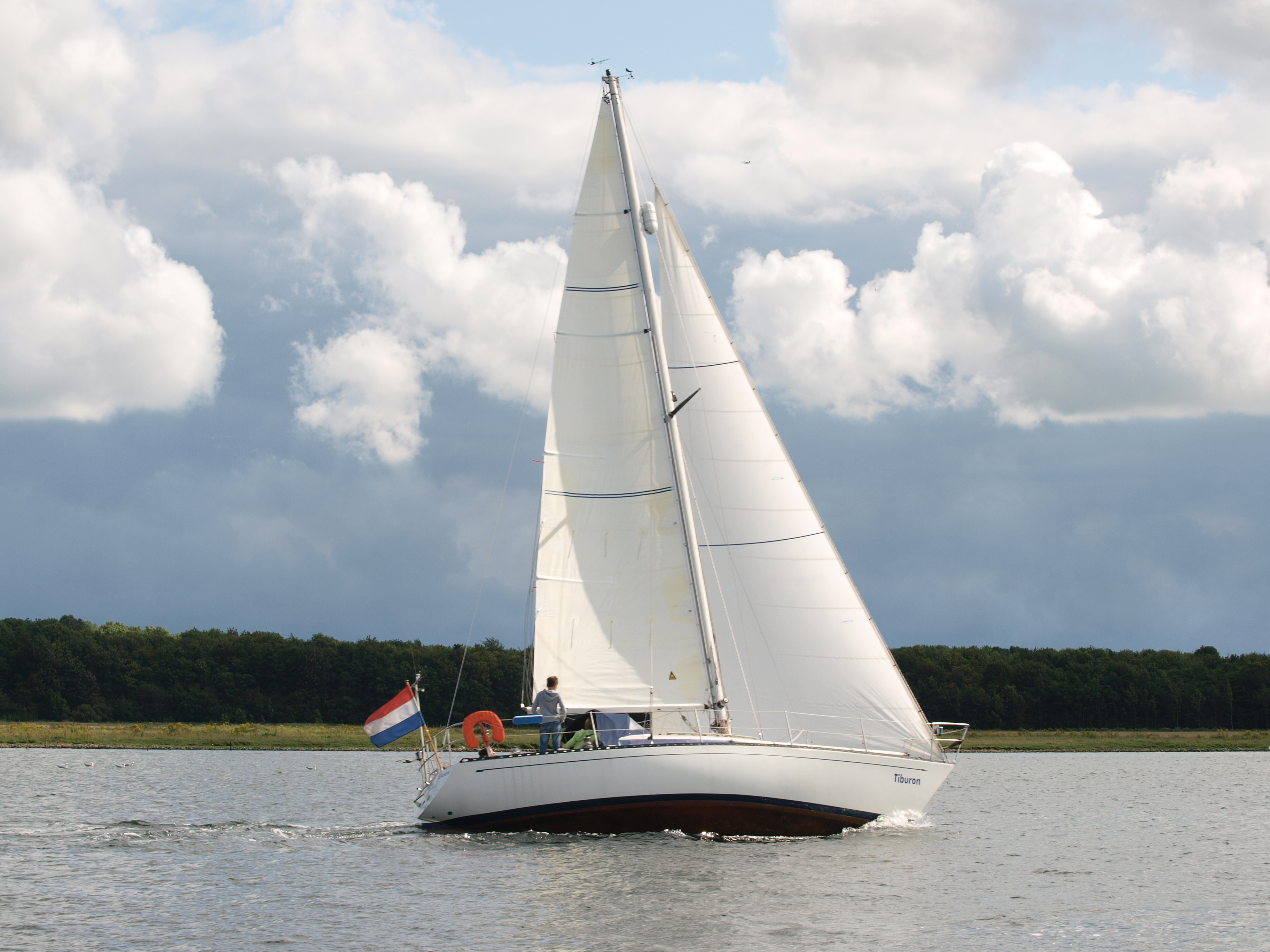 Standfast 33 Tiburon zeilboot op het Veerse Meer zomer 2011